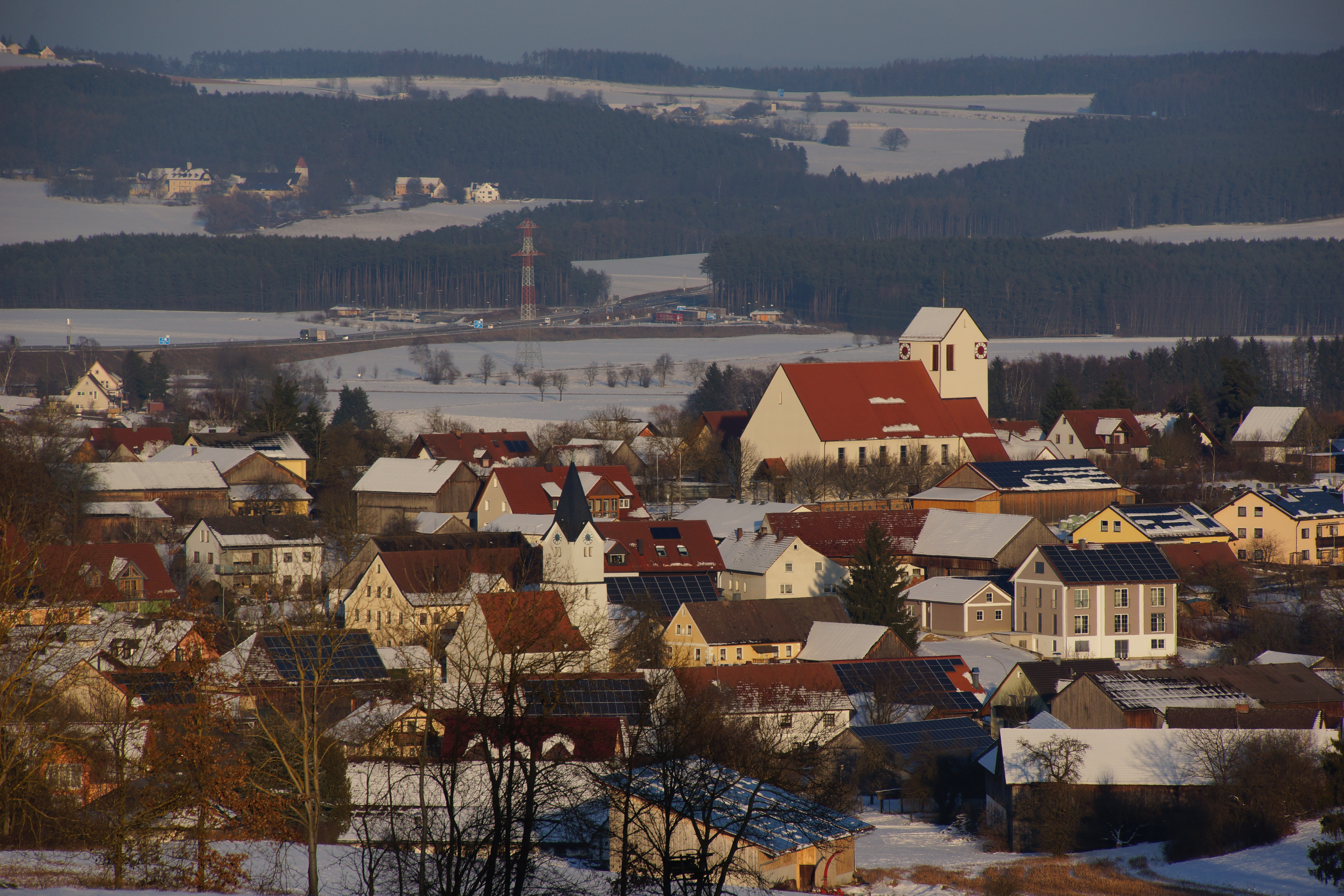 Blick auf Trisching bei Schmidgaden in der Oberpfalz